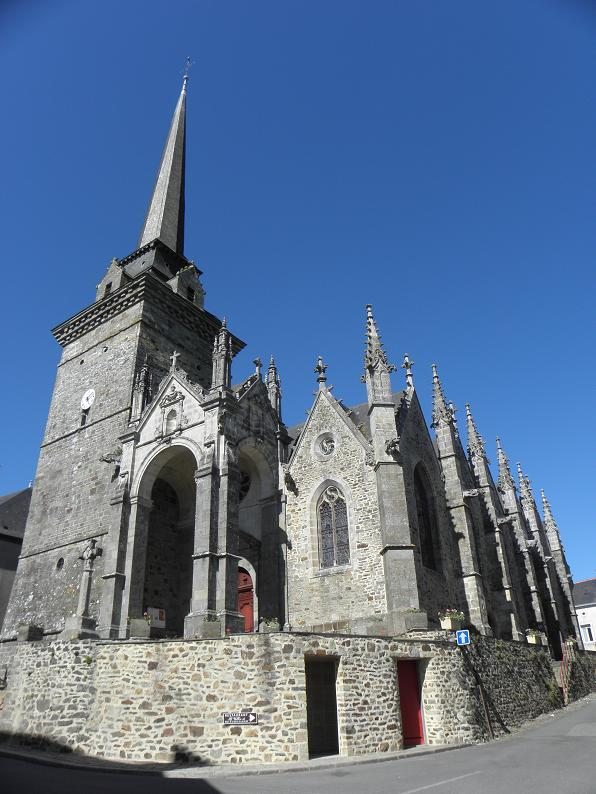 Façade occidentale et flanc sud de l'église Saint-Sulpice de Gennes-sur-Seiche (35).